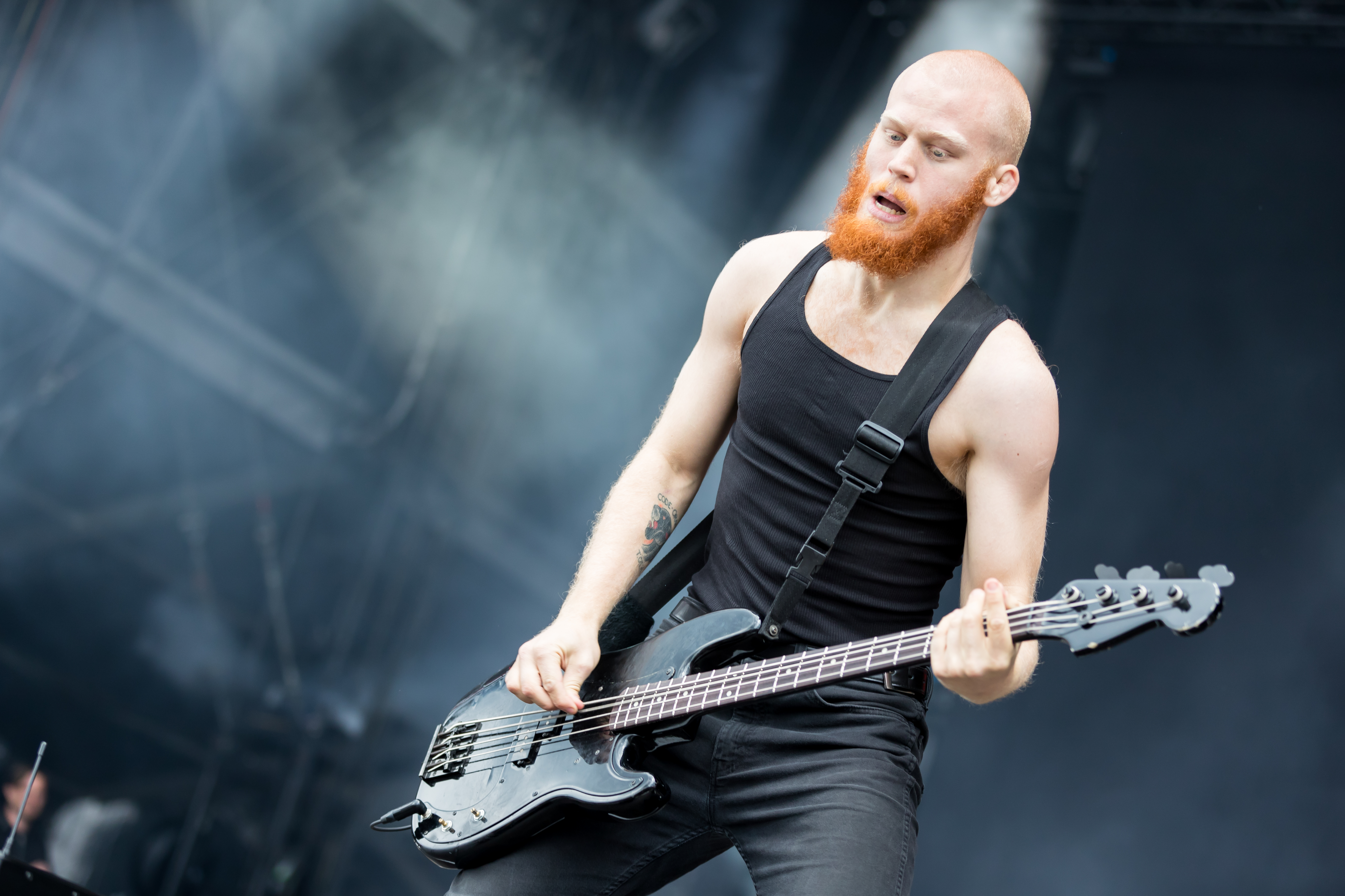 Code Orange during Rock am Ring at Nürburgring, Nürburg, Rheinland Pfalz, Germany on 2017-06-04, Photo: Sven Mandel